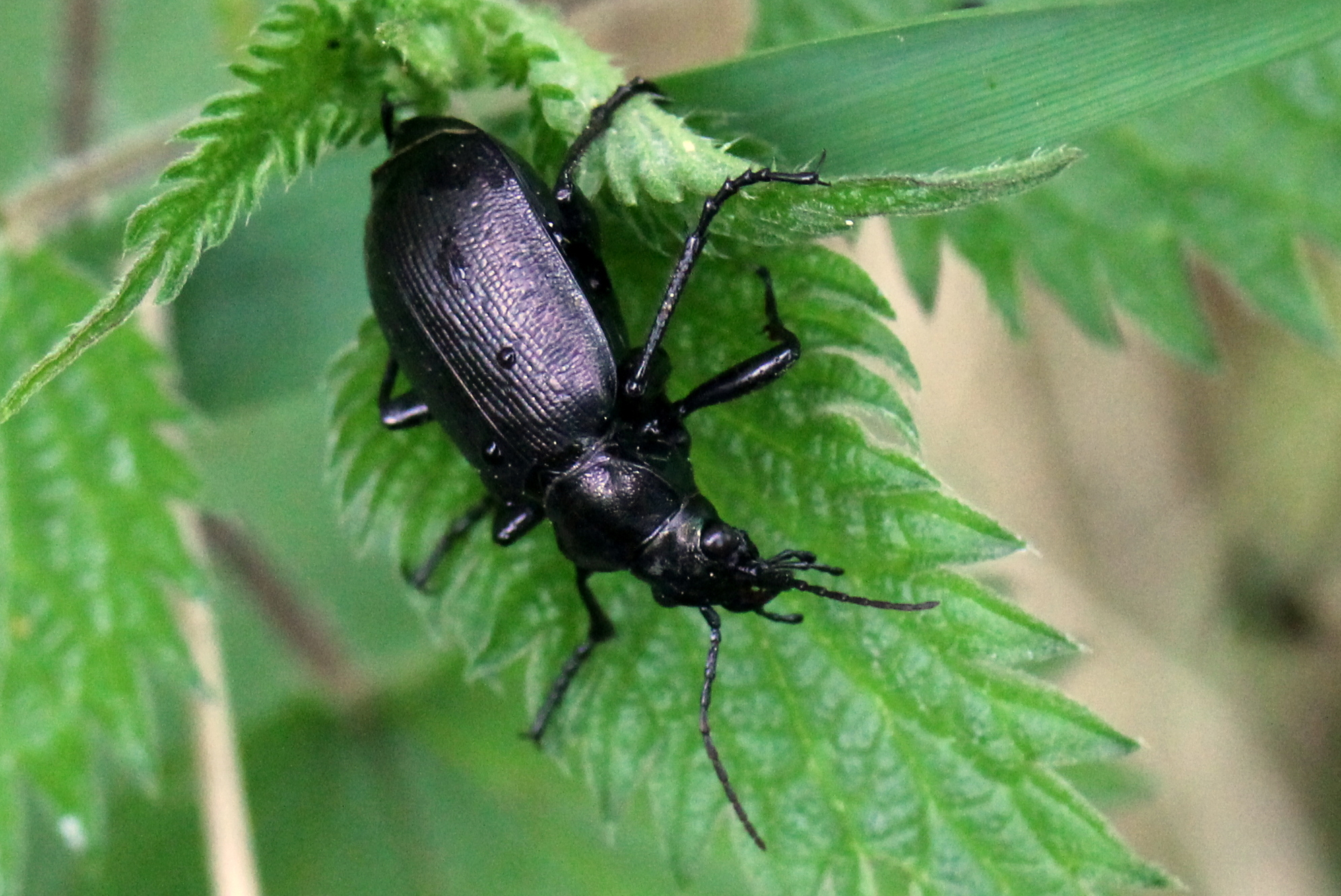 Loopkever in natuurgebied De Brand